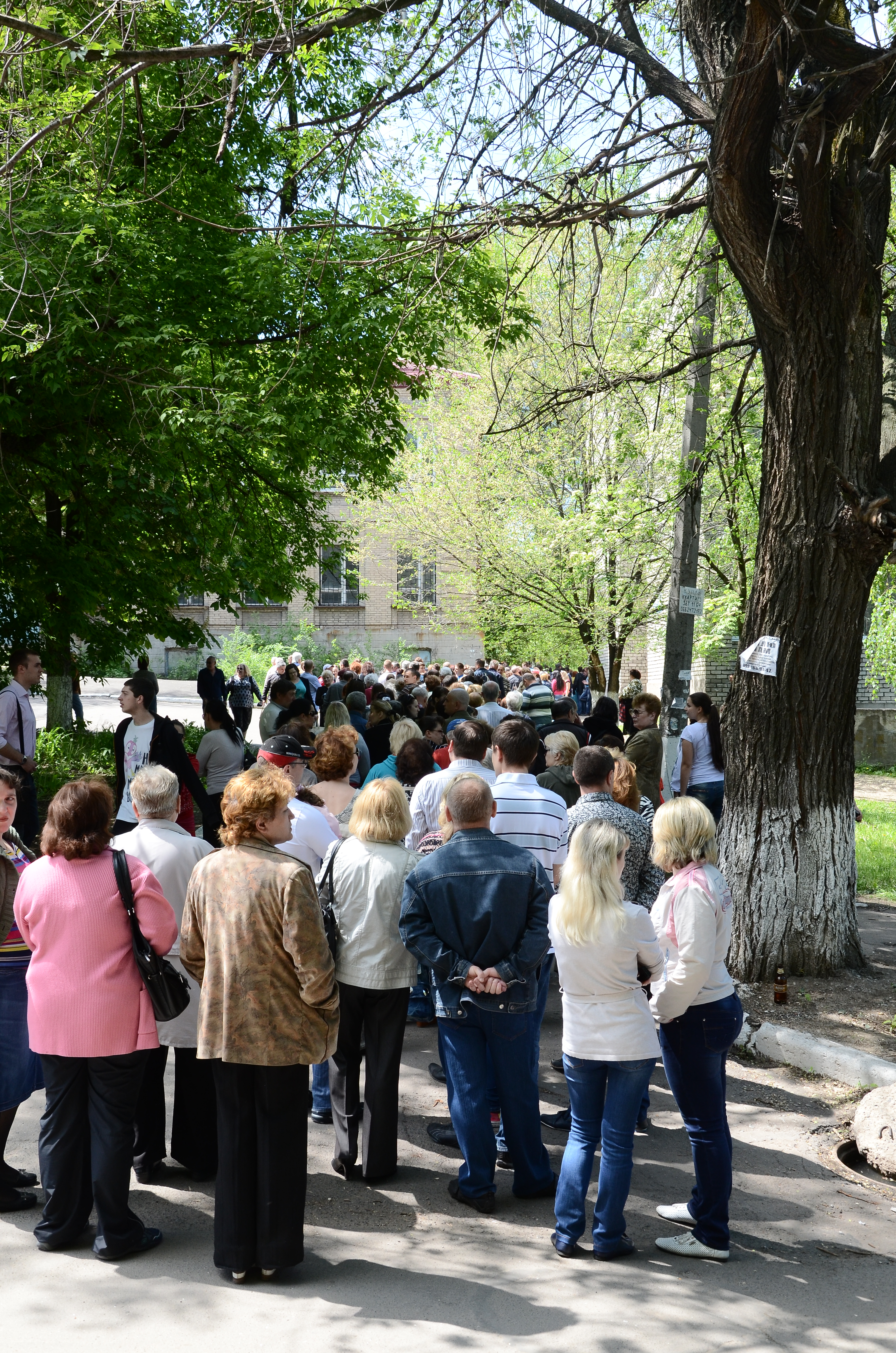 Референдум в Донецке